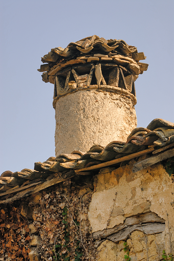 Elia herrian, Nafarroan, tximinia hau zegoen. Zaharra zegoen, eta inork konpondu ez zuenez, erori egin zen.